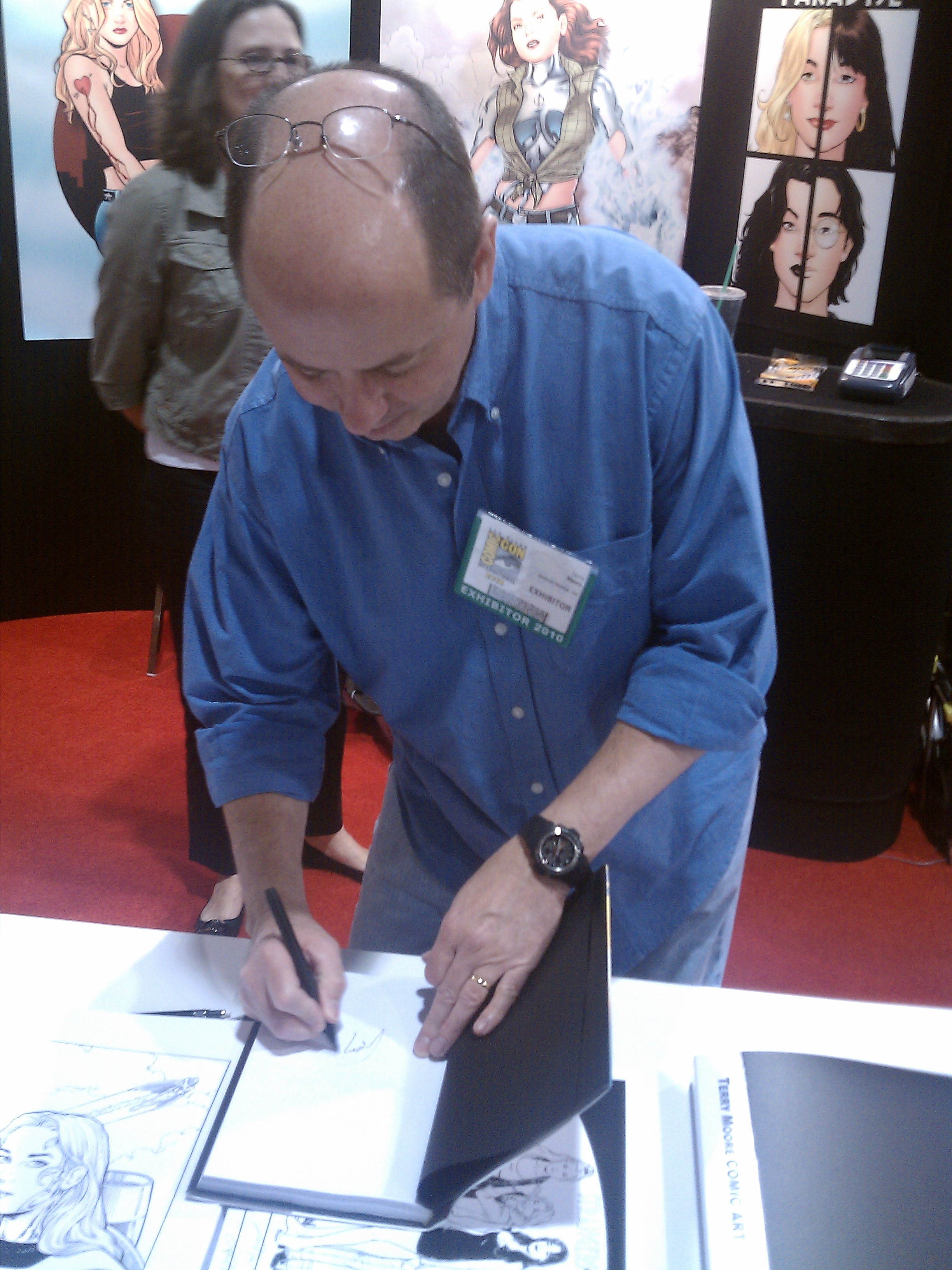 Terry Moore firmando una edición en tapa dura de Strangers in Paradise en la edición de 2010 de San Diego Comic-Con.